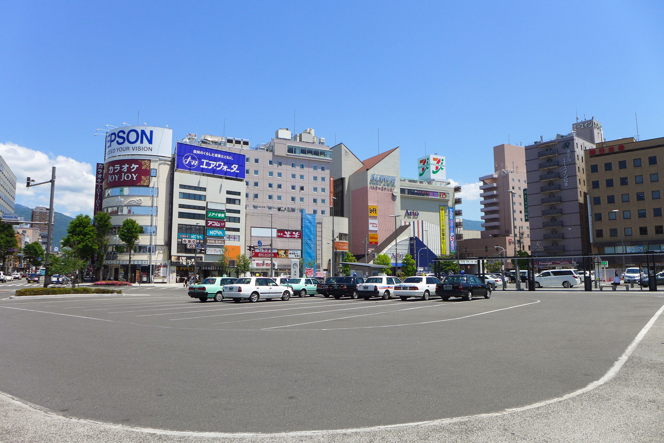 Matsumoto